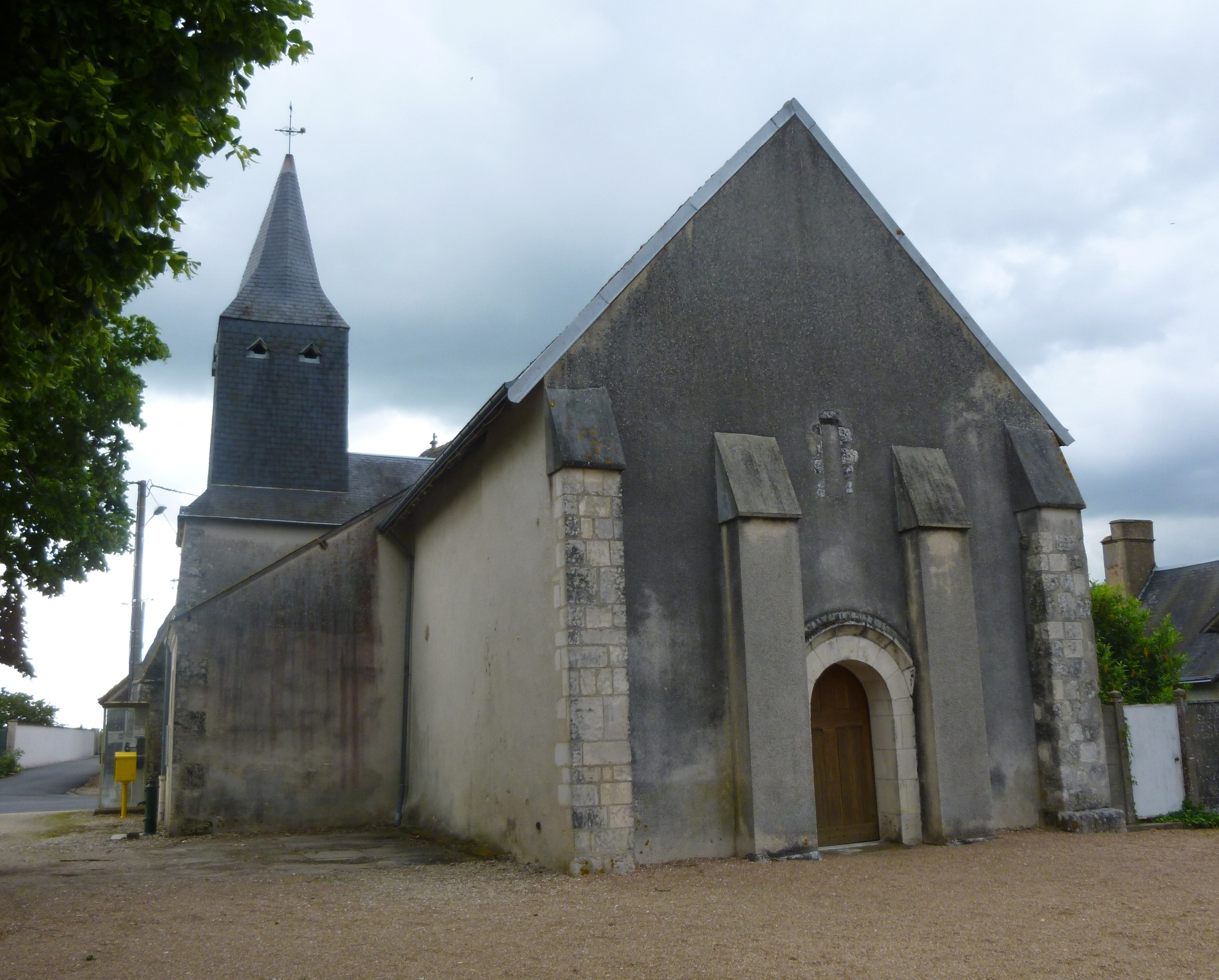 Eglise de Villiersfaux